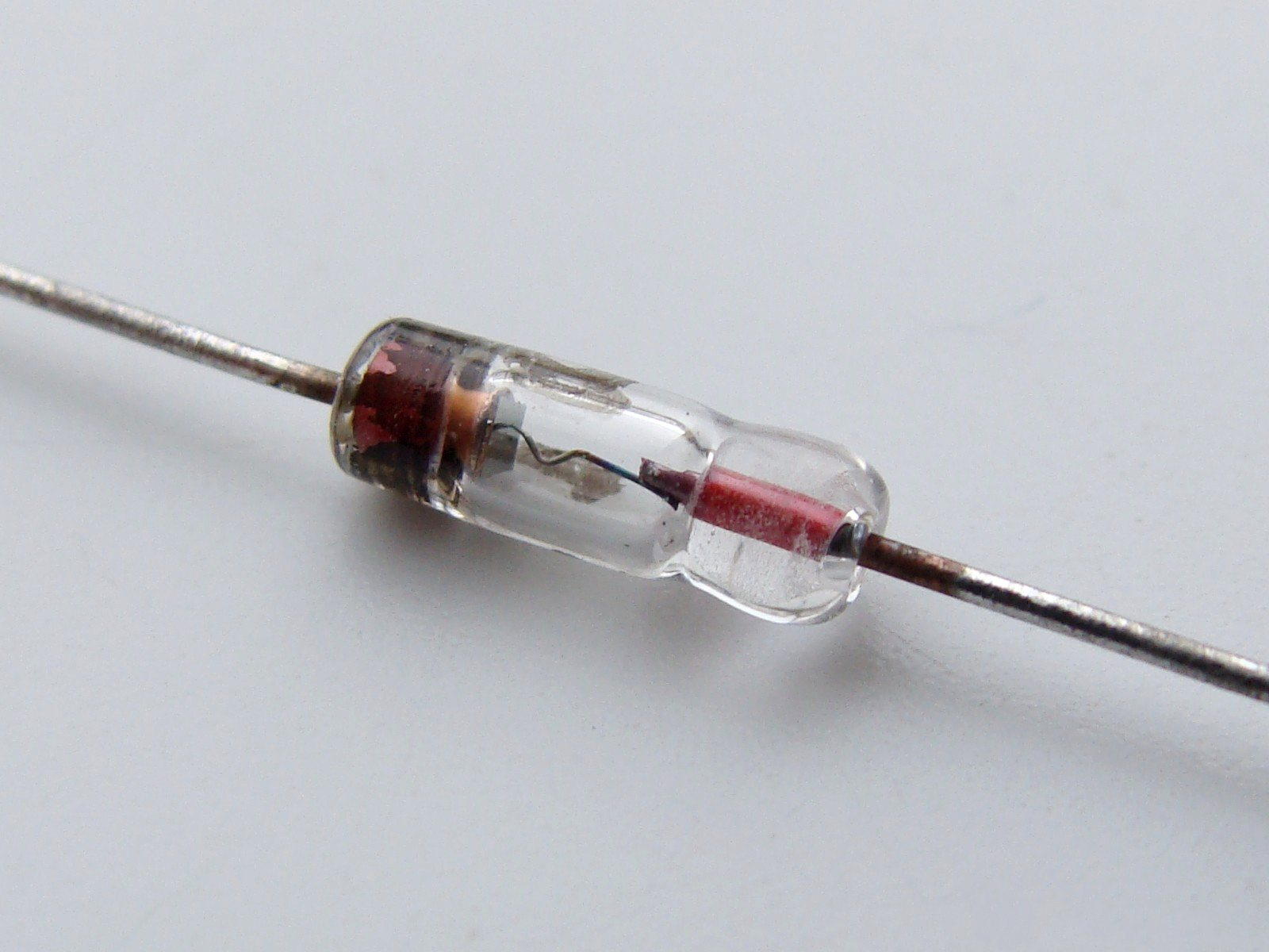 Germanium Diode 1N60